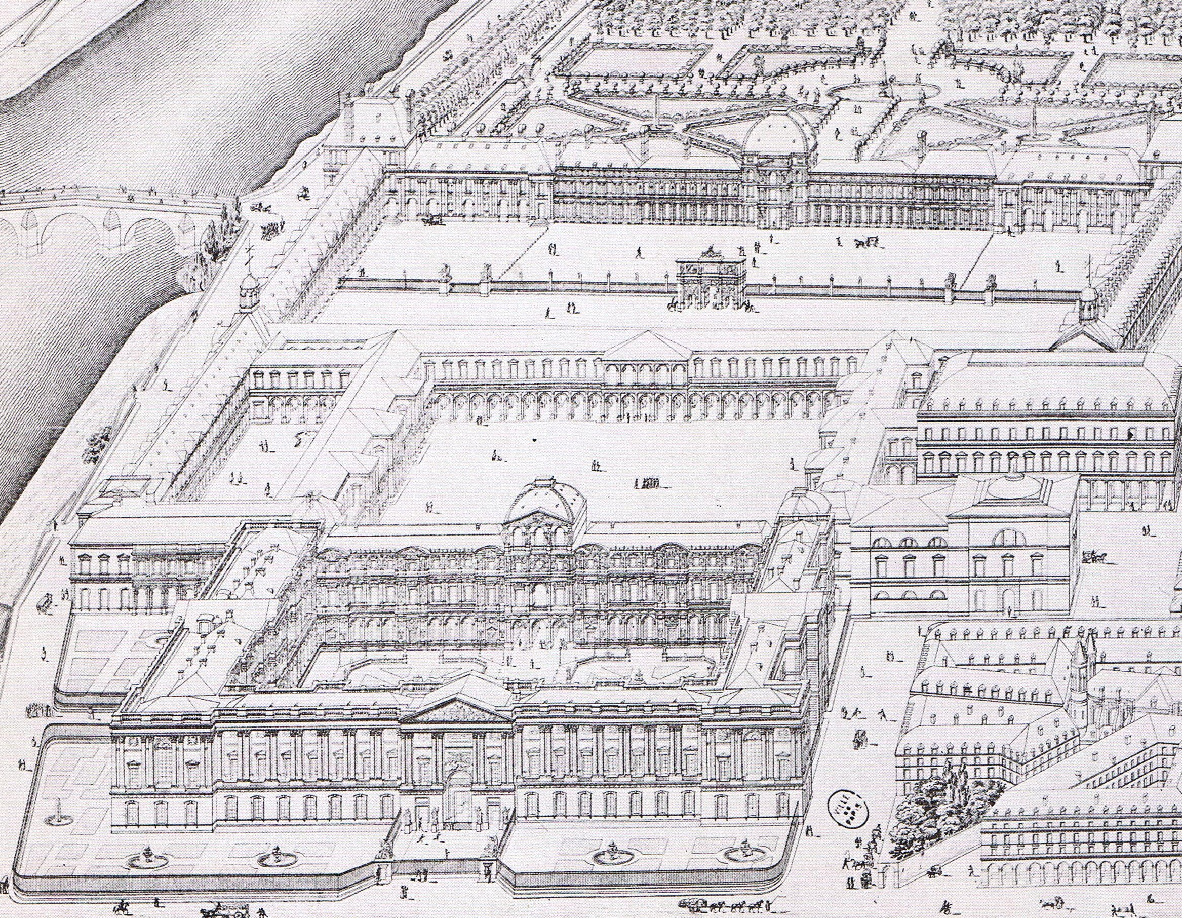 Pprojet de réunion du Louvre et des Tuileries.